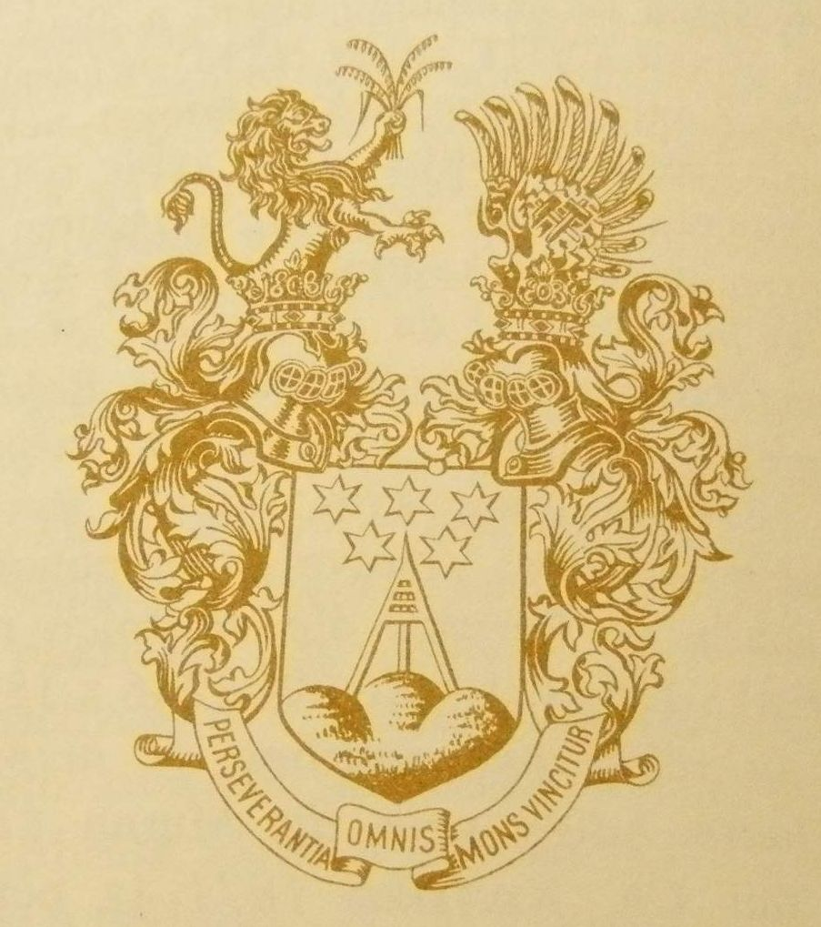 Rytířský erb Prof. Karla Kořistky